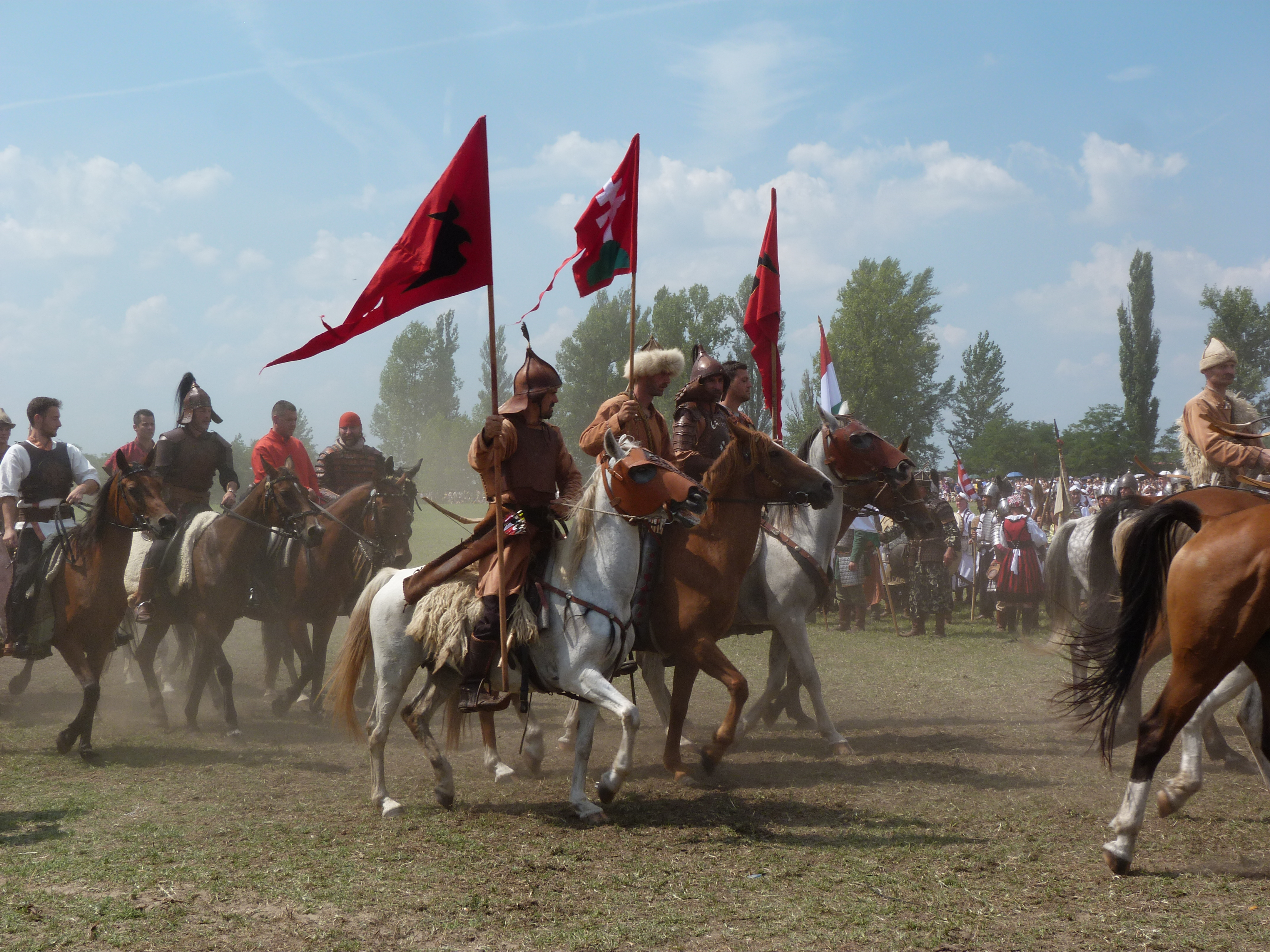 A felvétel 2014. augusztus 9-én, szombaton készült Bugacon. Kurultáj, magyar törzsi gyűlés. ©© Derzsi Elekes Andor, Budapest 2014, You are authorised to use these photos and vids under Creative Commons – even for commercial, for profit purposes. Photos must be attributed to Derzsi Elekes Andor. All of the photos and vids in the Metapolisz DVD line are under Creative Commons and can be used even for commercial – for profit – purposes. Recommended Citation Derzsi Elekes Andor: Metapolisz DVD line